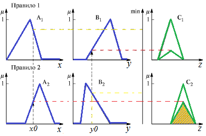 Алгоритм Ларсена